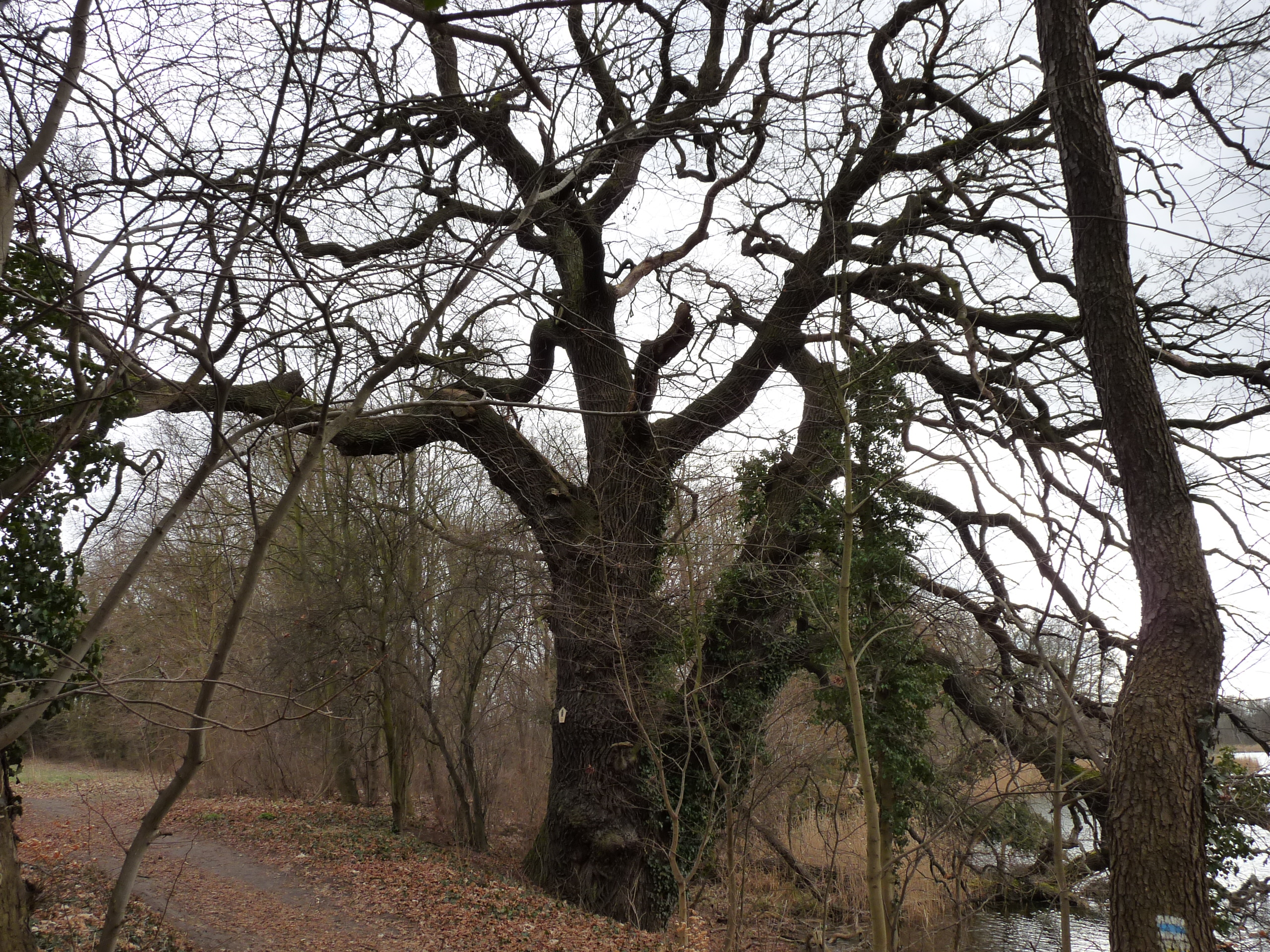 Stiel-Eichen (Quercus robur) am Plessower See, nahe an der BAB 10.